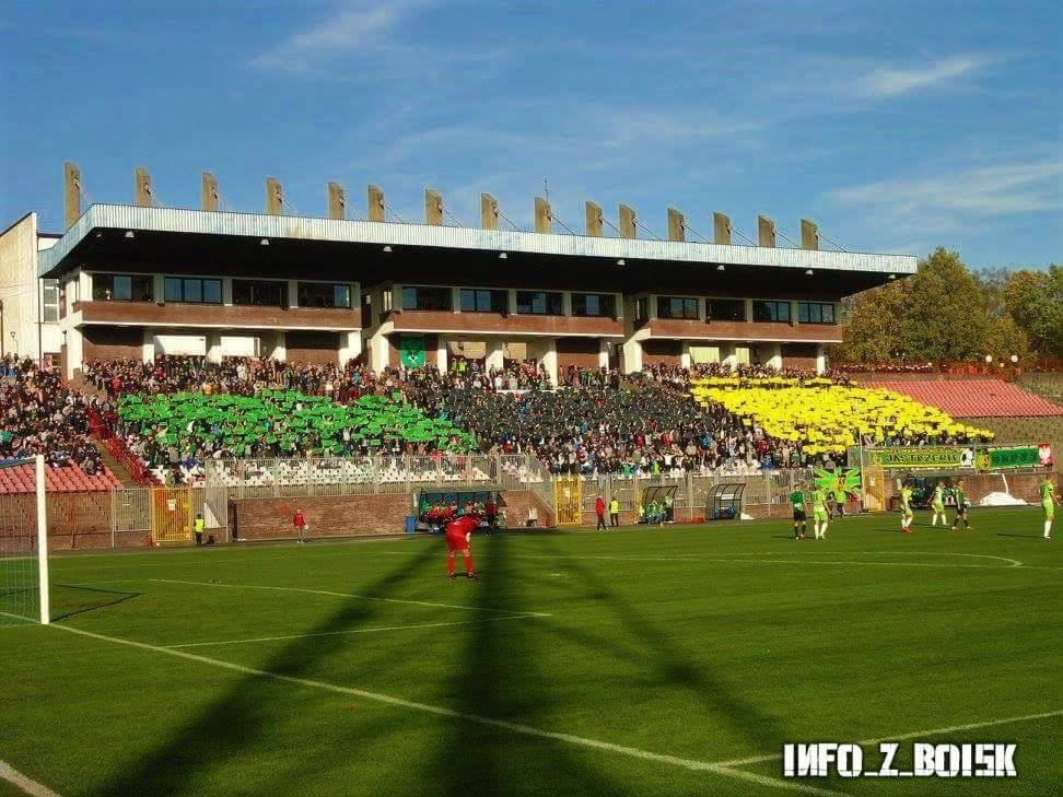 Stadion Miejski w Jastrzębiu-Zdroju. Miejsce zmagań KS GKS-u 1962 Jastrzębie